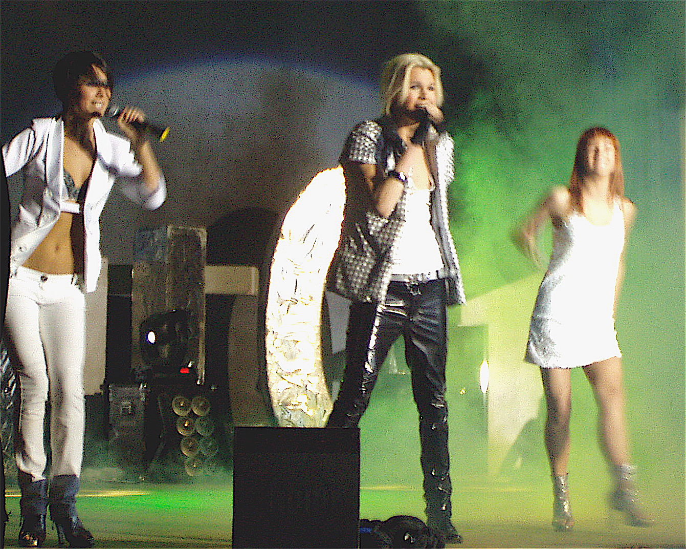 Концерт тура "Фабрика в твоєму місті" у Чернігові. Виступ Бориса Апрєля.